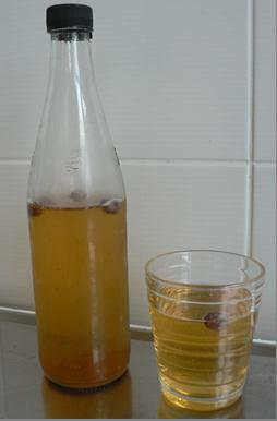 Trinkfertiges Sima